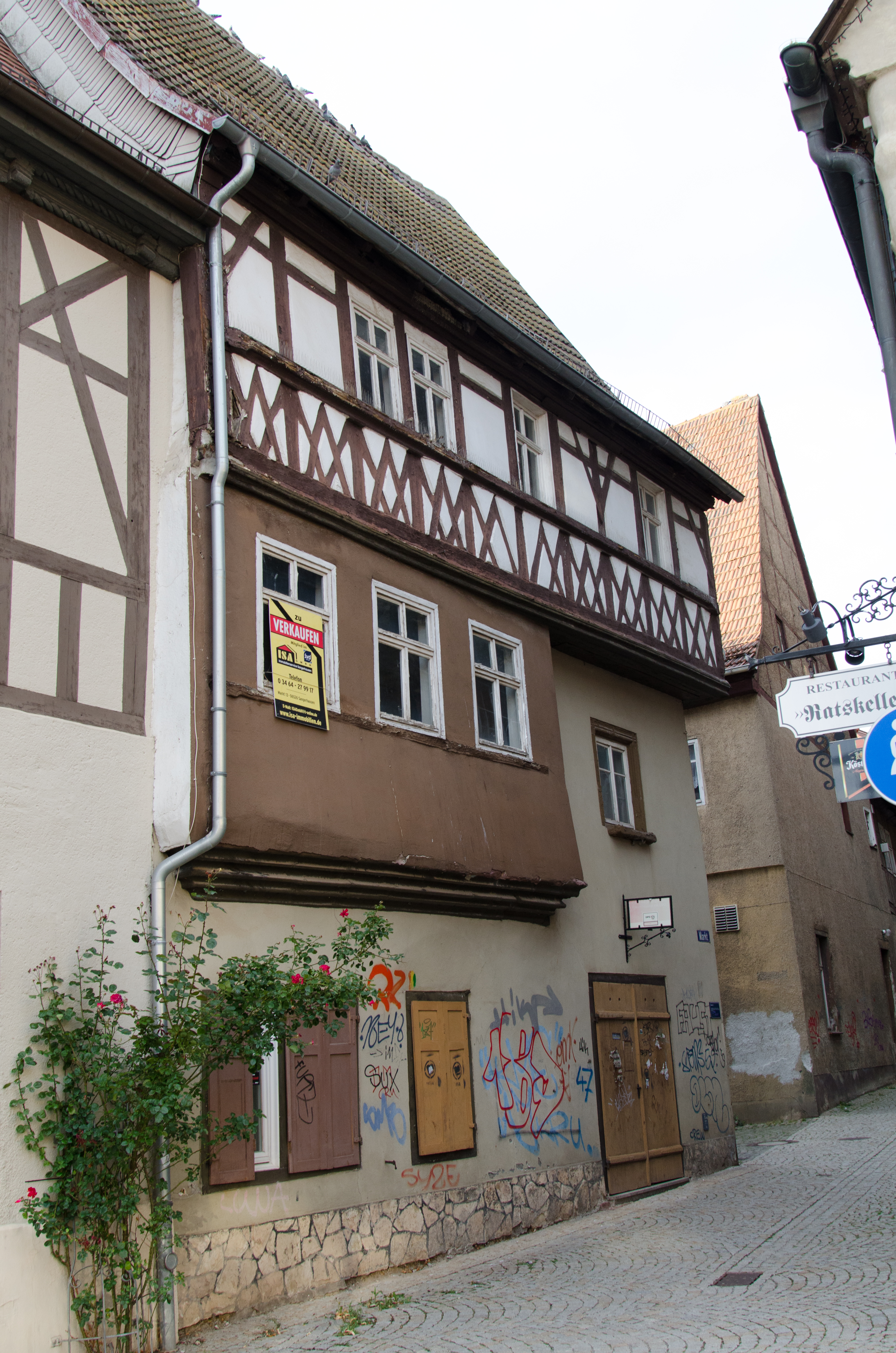 Sangerhausen, Markt 6